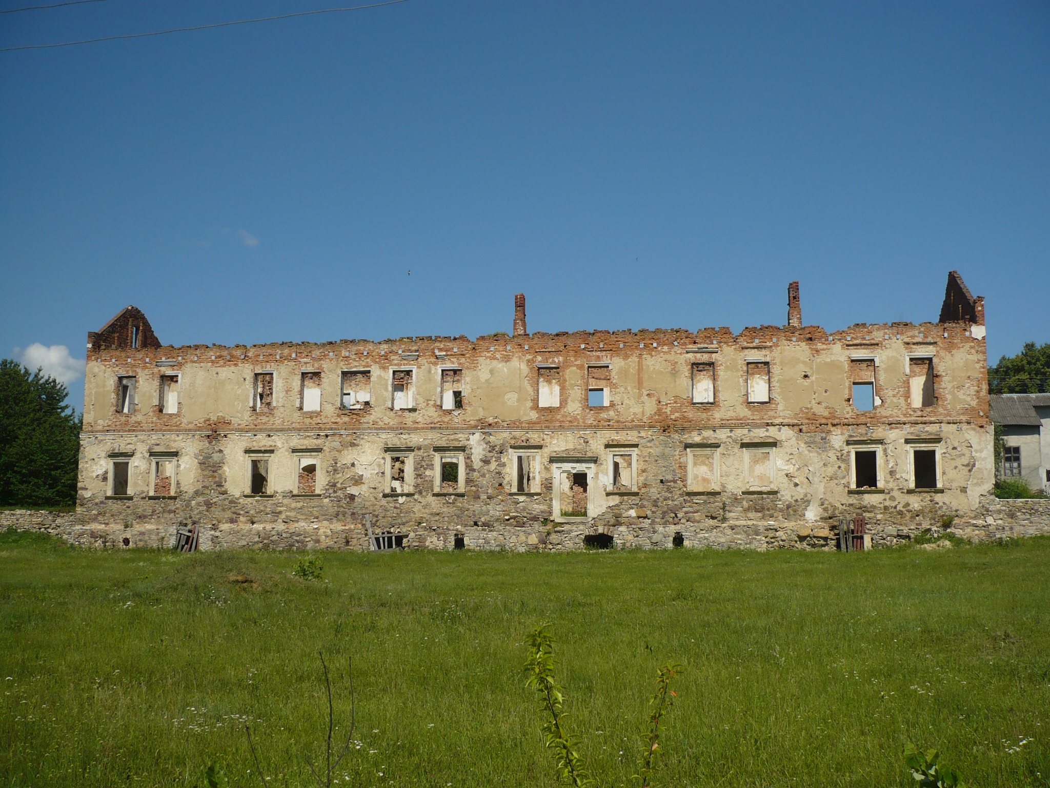 Potok Złoty. Zamek